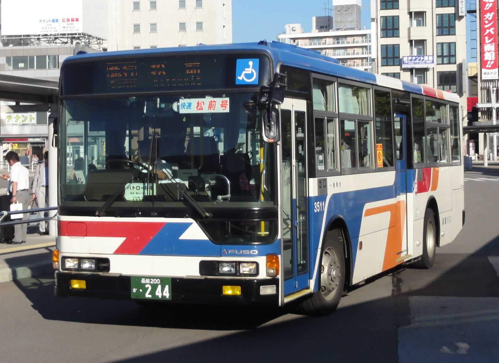 Hakodate Bus car 函館バス 快速松前号